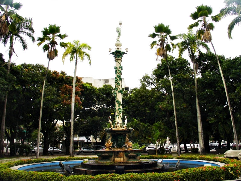 Fonte na Praça do Entroncamento - Recife, Pernambuco, Brasil